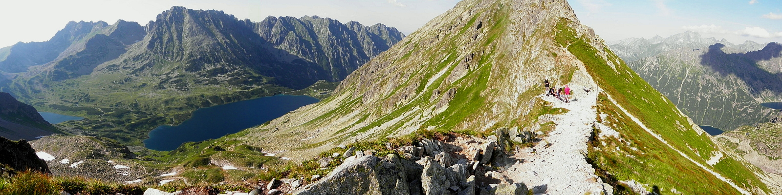 Panorama ze Szpiglasowej Przełęczy. Od lewej Dolina Pięciu Stawów Polskich z Kozim Wierchem,centralnie Miedziane, po lewej Morskie Oko i Czarny Staw Pod Rysami